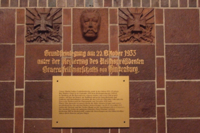 Martin-Luther-Gedächtniskirche Berlin-Mariendorf, Gedenken zur Grundsteinlegung Fotograf: Harald Rossa Datum: September 2006 Höher aufgelöste Version ist verfügbar